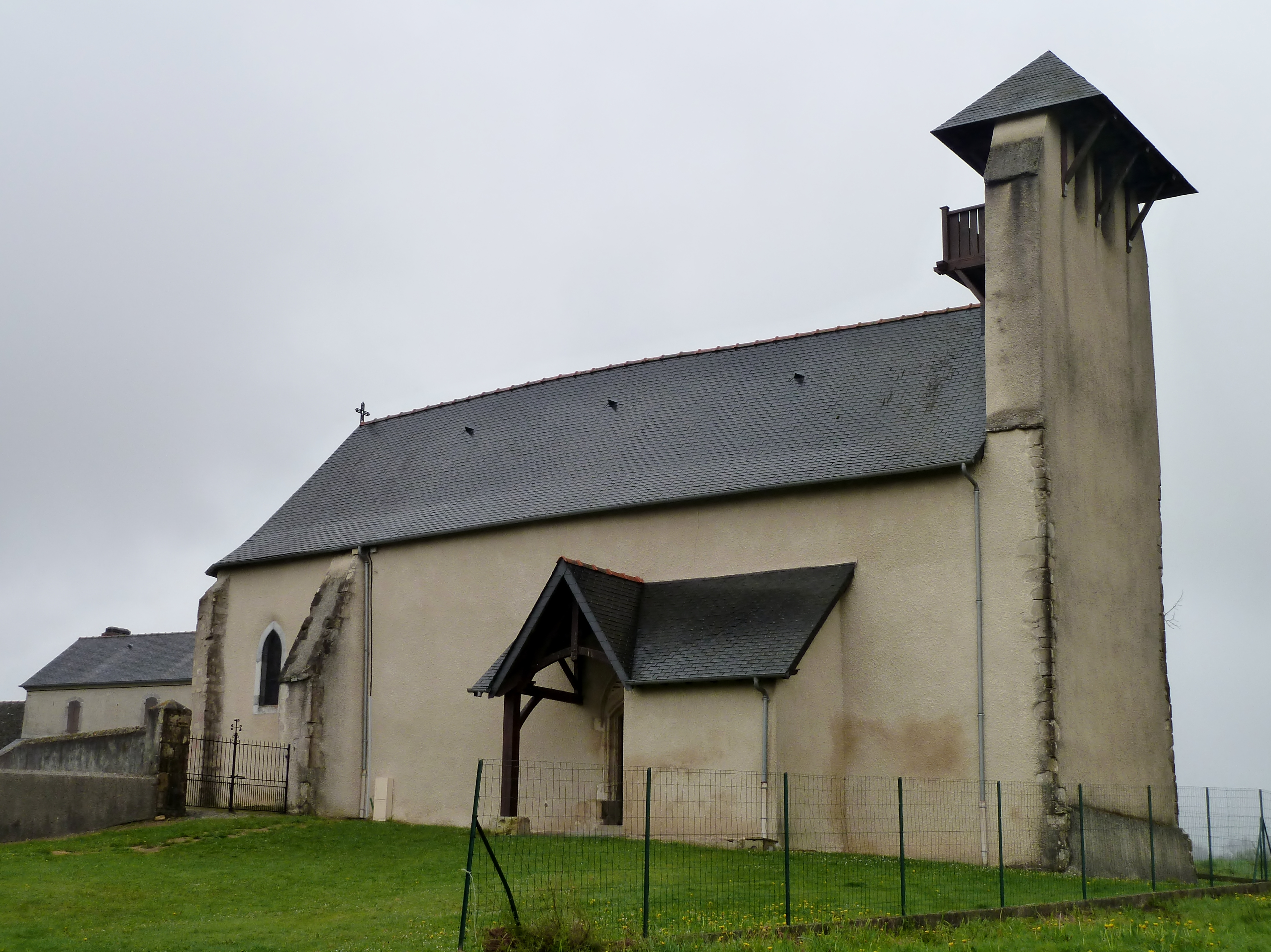 Église de Saubole